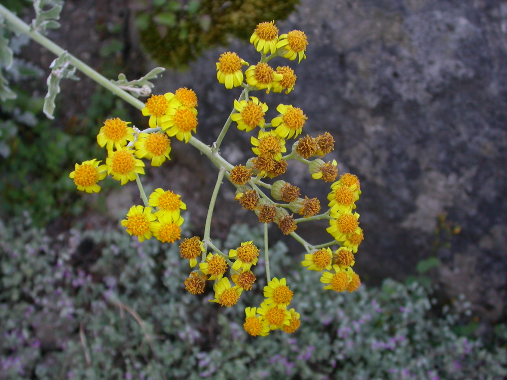 Jacobaea gibbosa